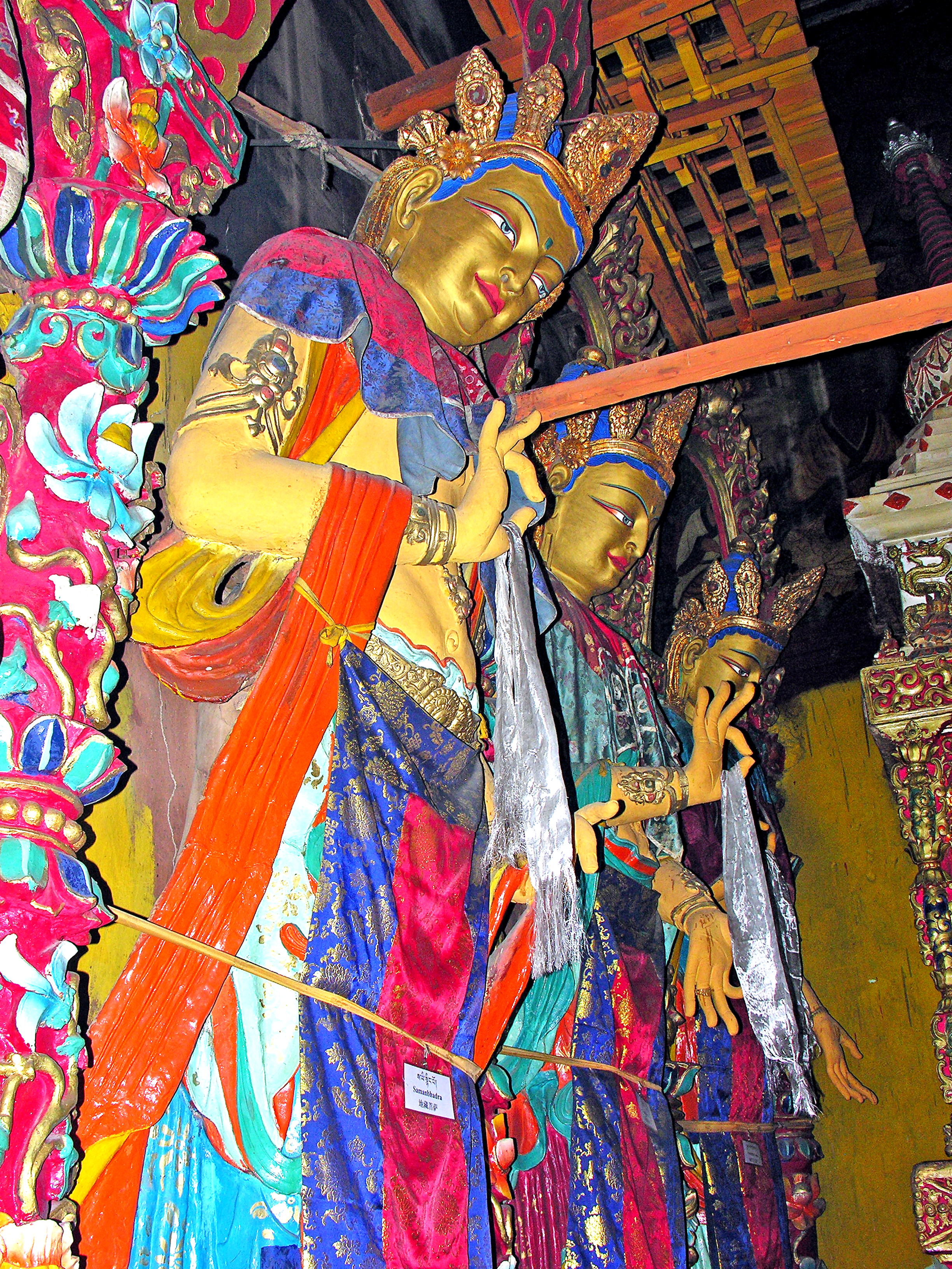 Samanbhadra at the Depung Monastery. Lhasa, Tibet